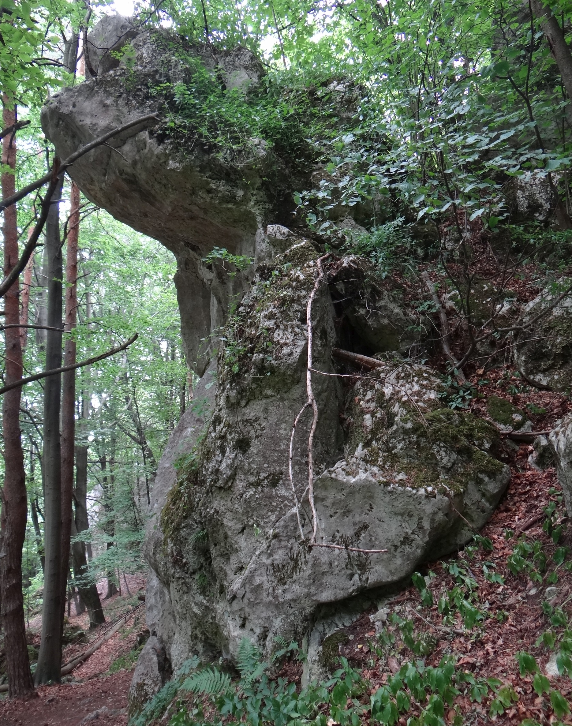 Skała Ropusza na wzgórzu Łężec między Morskiem i Podlesicami